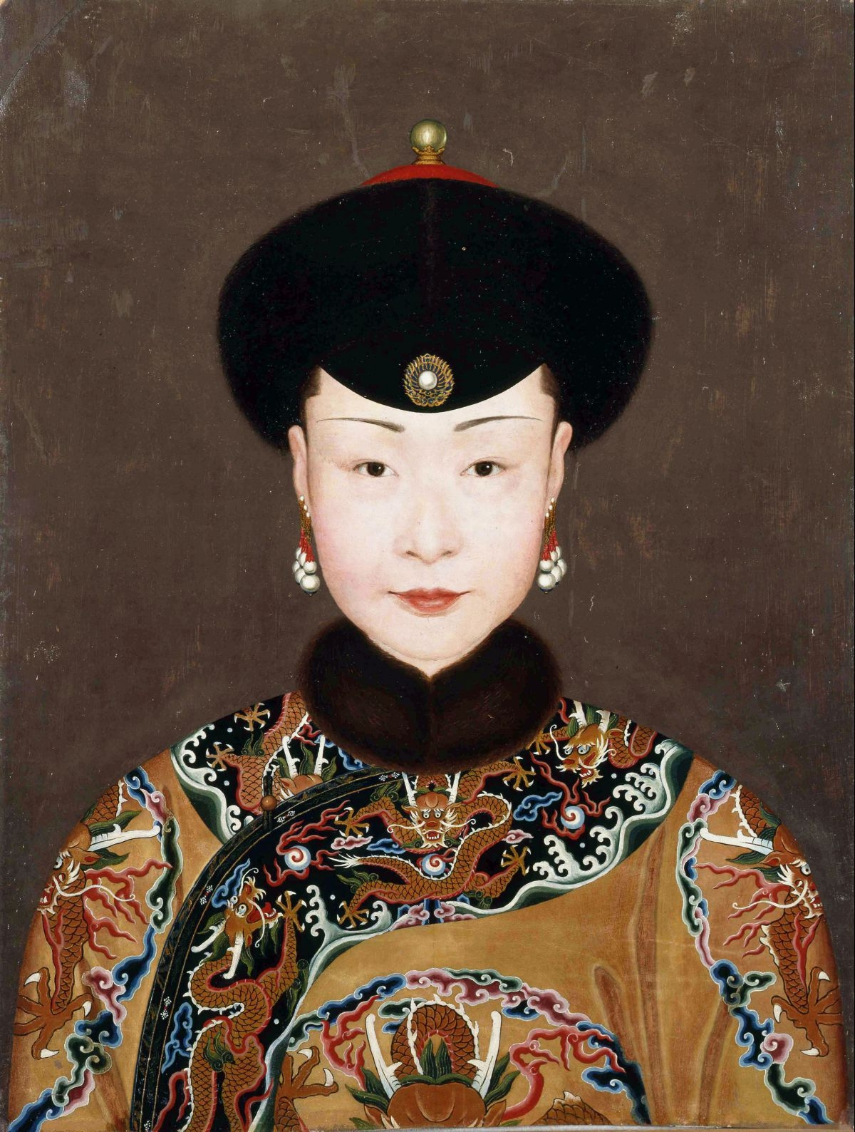 Portrait de Ulanara, la deuxième épouse de l'empereur chinois Qianlong (1736–1795)